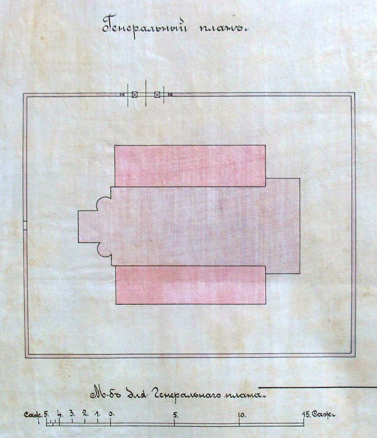 Беларуская (тарашкевіца): Ашмяны (Ašmiany), пляц Рынак (plac Rynak) з боку вуліцы Гальшанскай (vulica Halšanskaja). Касьцёл Сьвятога Міхала Арханёла